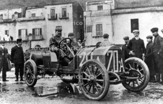 Circuito di Brescia, Vincenzo Lancia alla Targa Florio su Fiat 28-40 HP Corsa, 1907 (Fiat Group Marketing & Corporate Communication spa, Archivio e centro storico Fiat, Archivio iconografico, Lancia, Foto Piloti, Corse, 31)